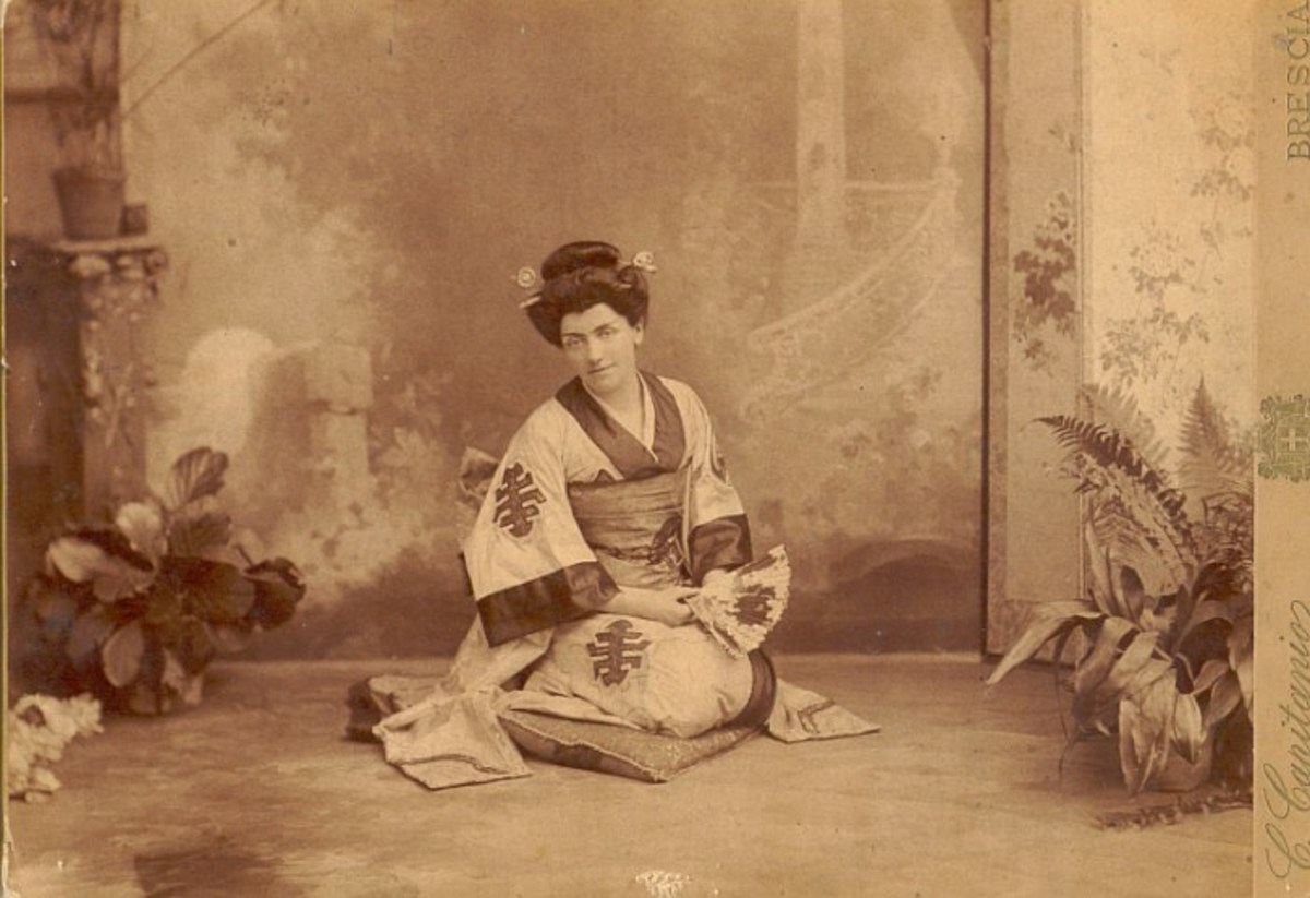 Соломія Крушельницька у ролі мадам Батерфляй